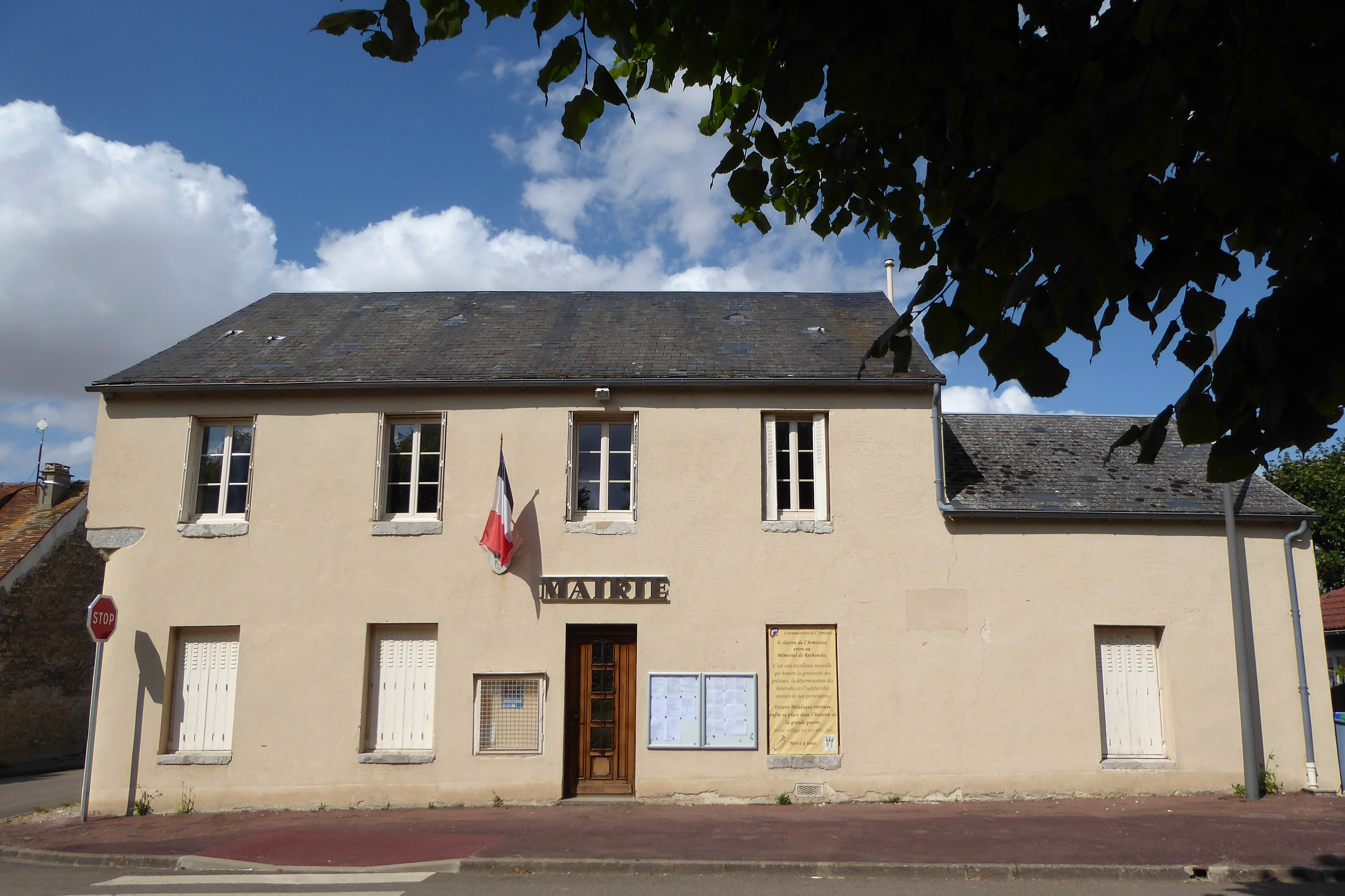 mairie d'Intréville, Eure-et-Loir, France.